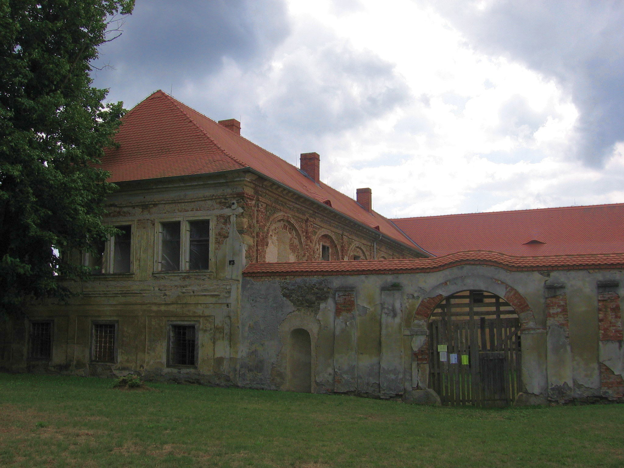 Zámek Čečovice, okr. Domažlice